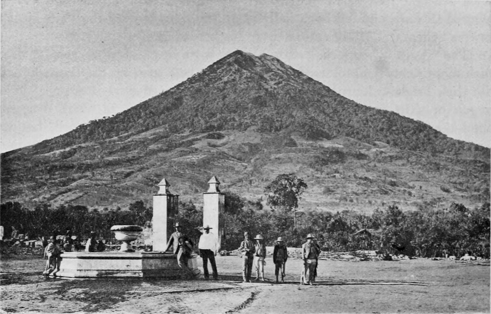 El volcán de Agua visto desde Santa María de Jesús en 1895.